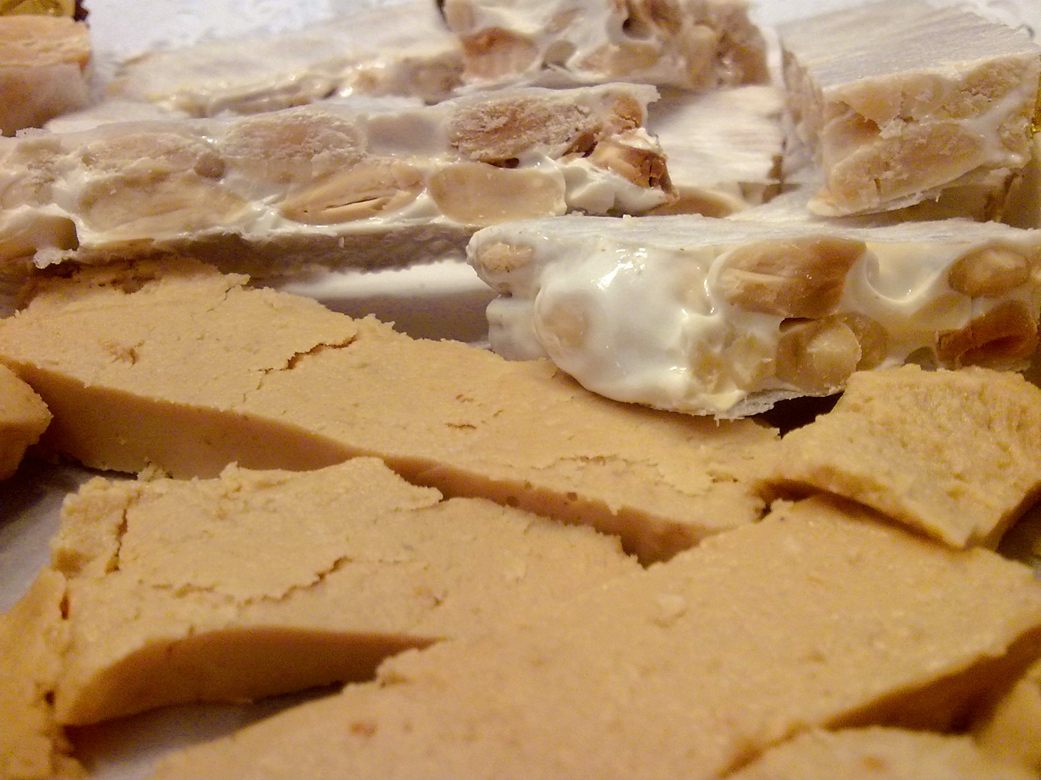 Dos clases de turrón: blando (o de Jijona) y duro (o de Alicante).